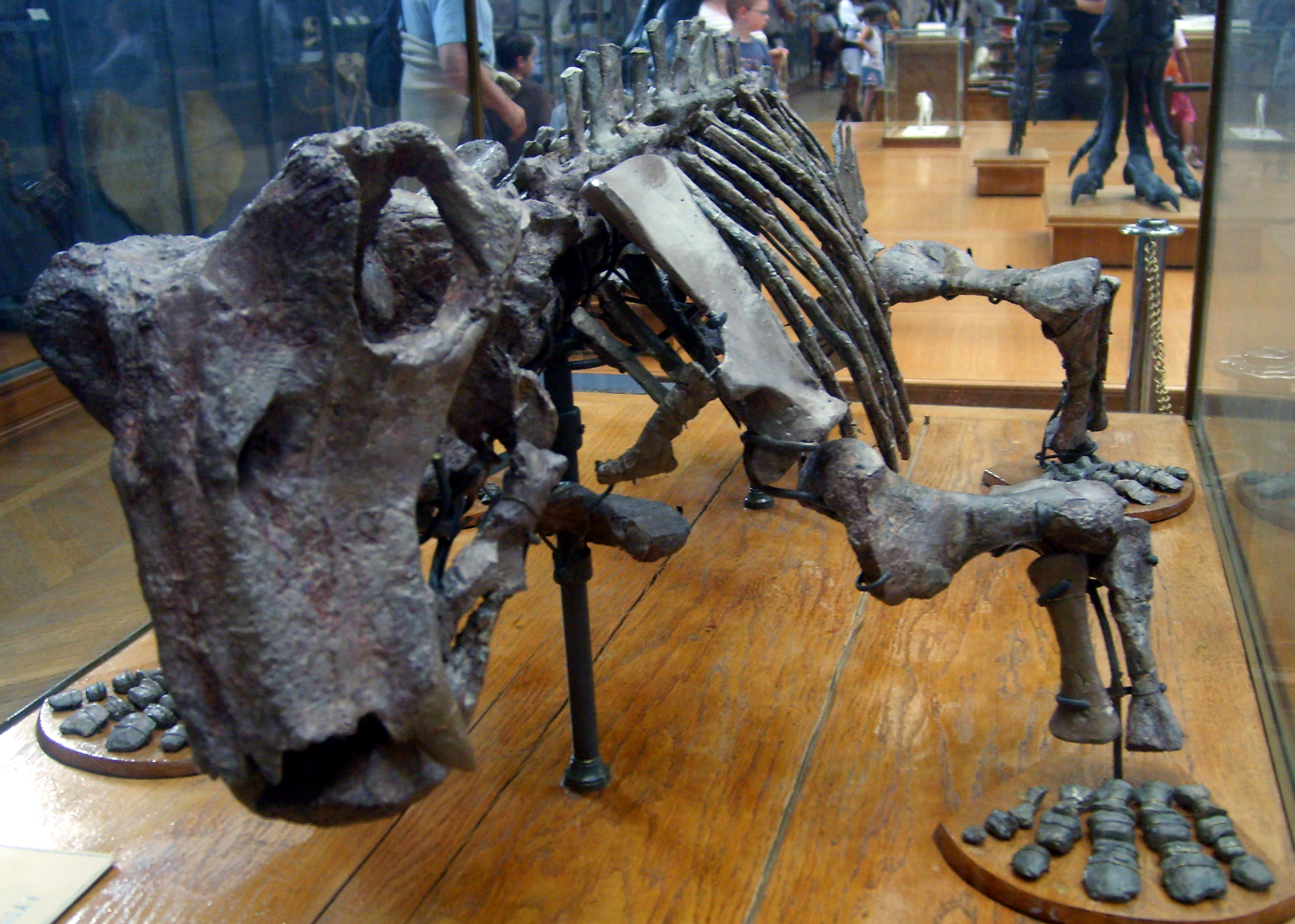 Lystrosaurus murrayi skeleton, Muséum national d'histoire naturelle, Paris.